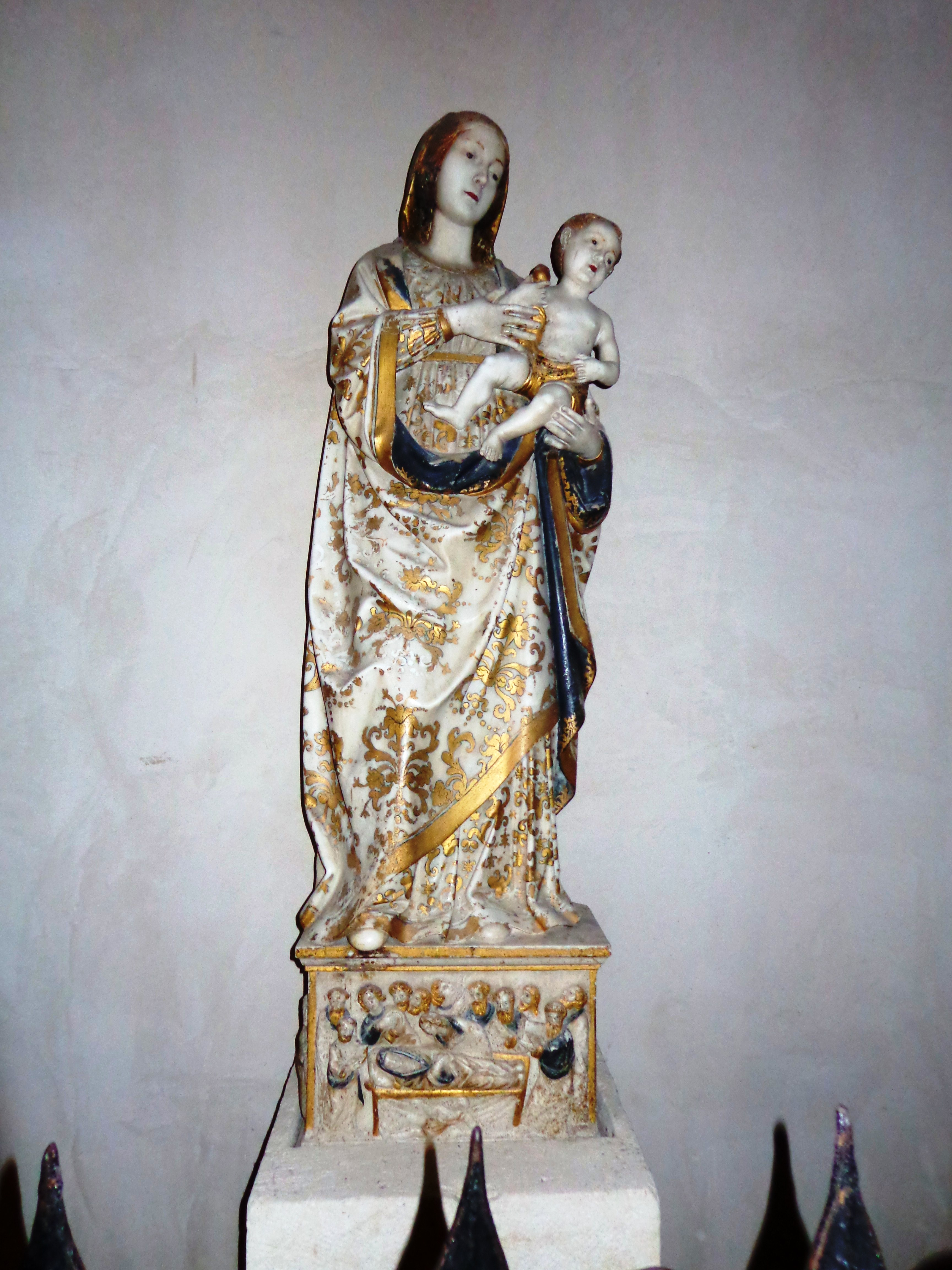 Madonna di Antonello Gagini Cattedrale di Cefalù